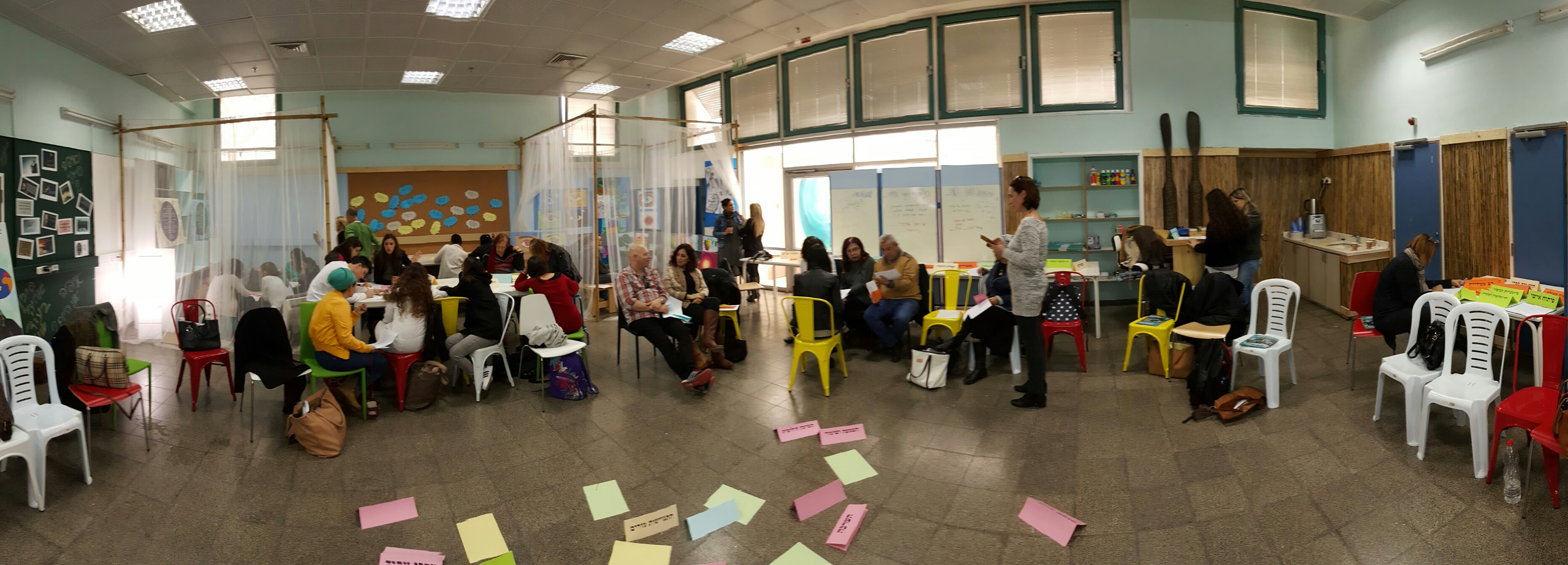 מרכז עתיד בבית הספר הניסויי אורט במעלה טבריה